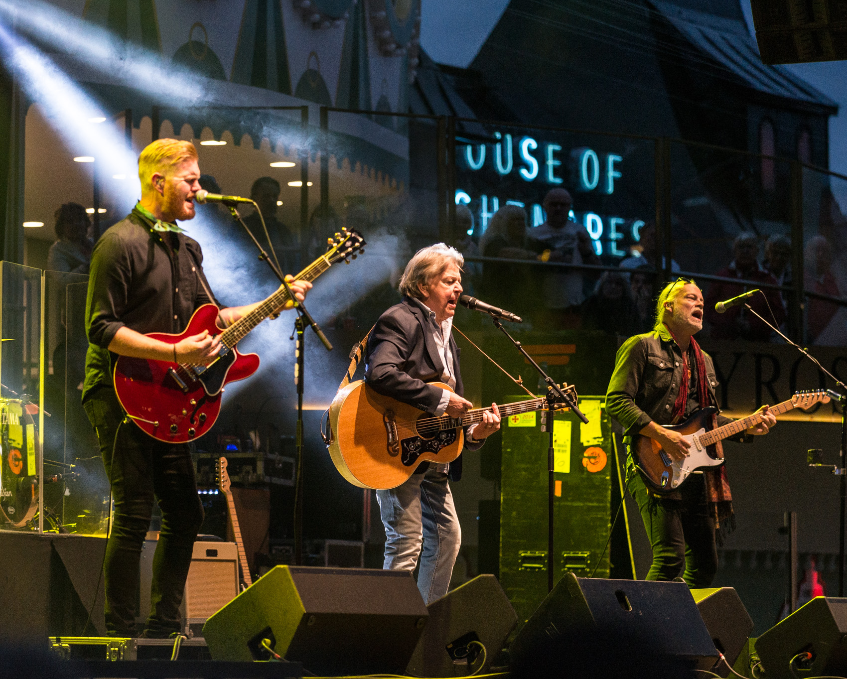 Sven-Ingvars uppträder inför en fulltalig publik på Gröna Lund i Stockholm den 12 augusti 2016. Oscar Magnusson, Sven-Erik Magnusson och Staffan Enestam på gitarr.